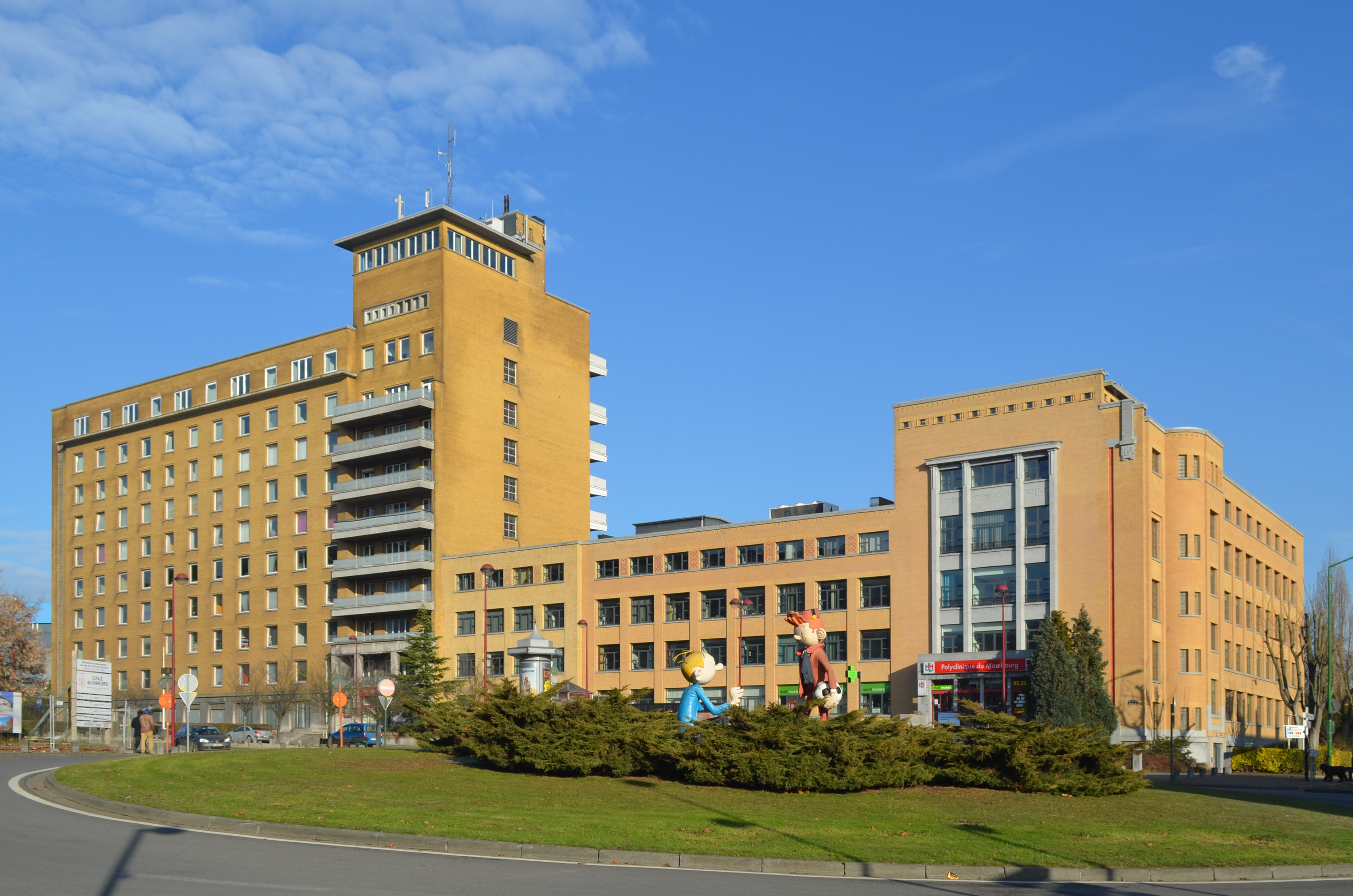 Charleroi - Polyclinique du Mambourg (anciennement institut Arthur Gailly) avec à l'avant plan la sculpture de Spirou (à droite) et Fantasio.